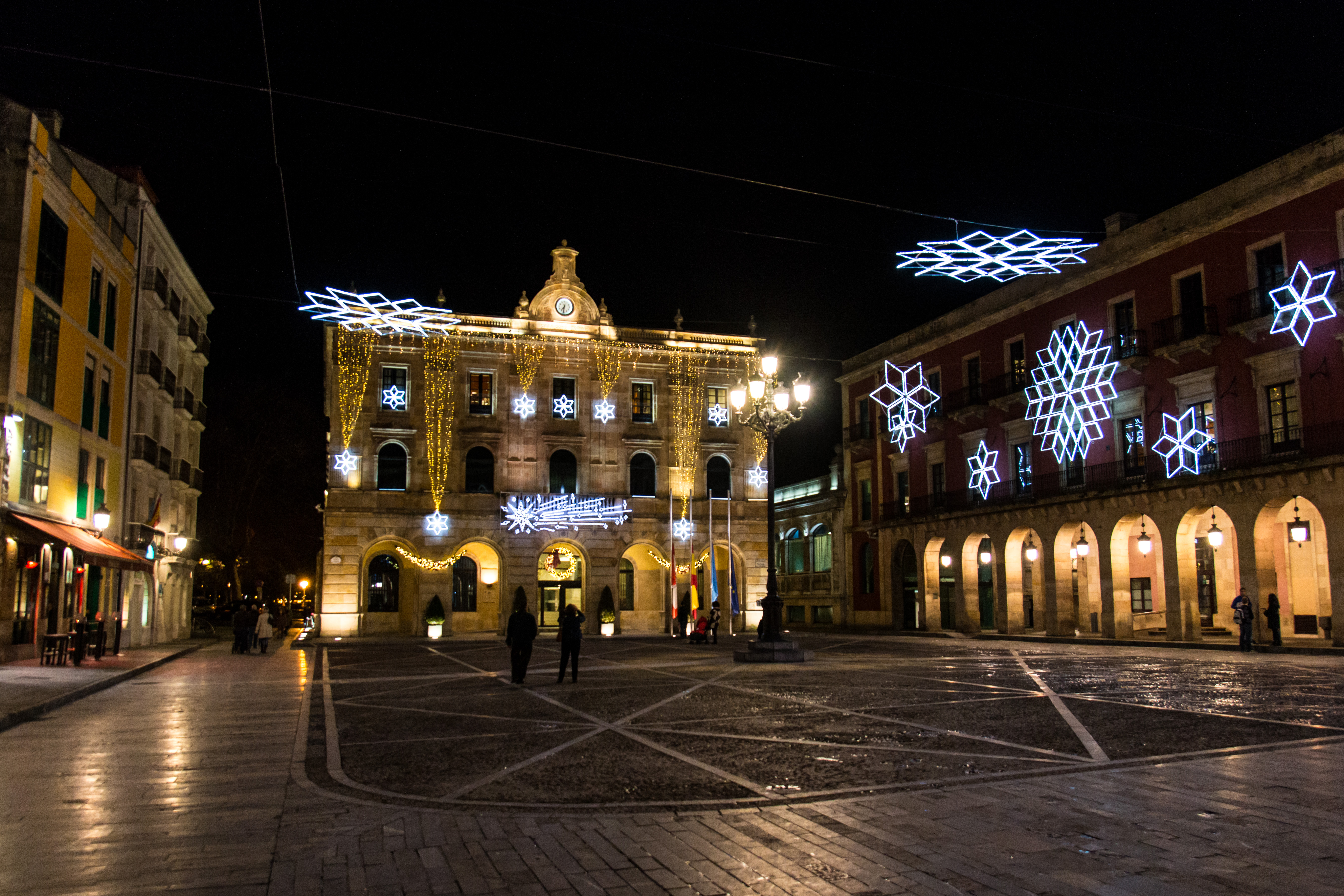 Plaza Mayor. Gijón. Navidad 2015-16